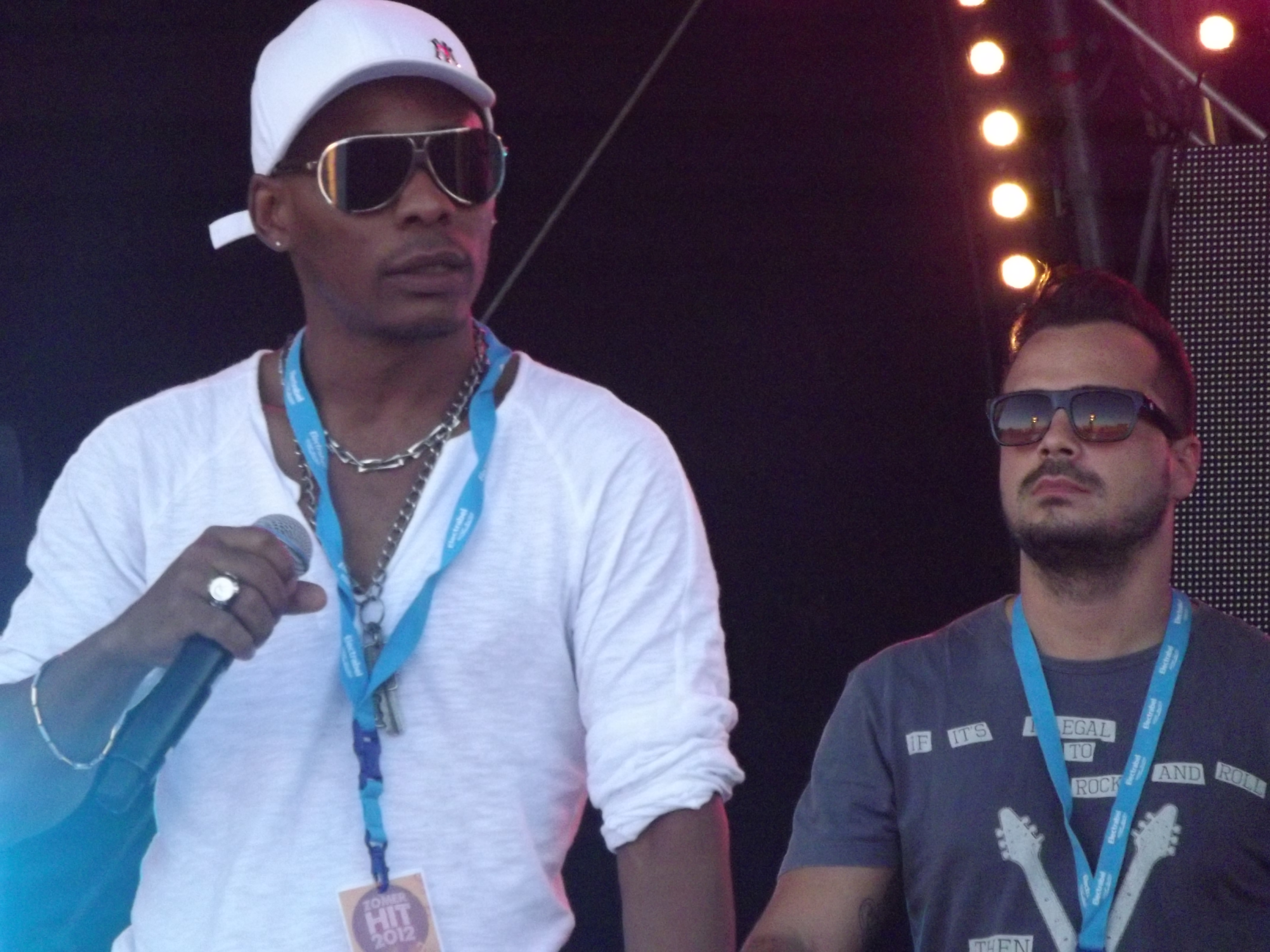 Tacabro tijdens de uitreiking van de Radio 2 Zomerhit-award op 17 augustus 2012 in Middelkerke-Westende